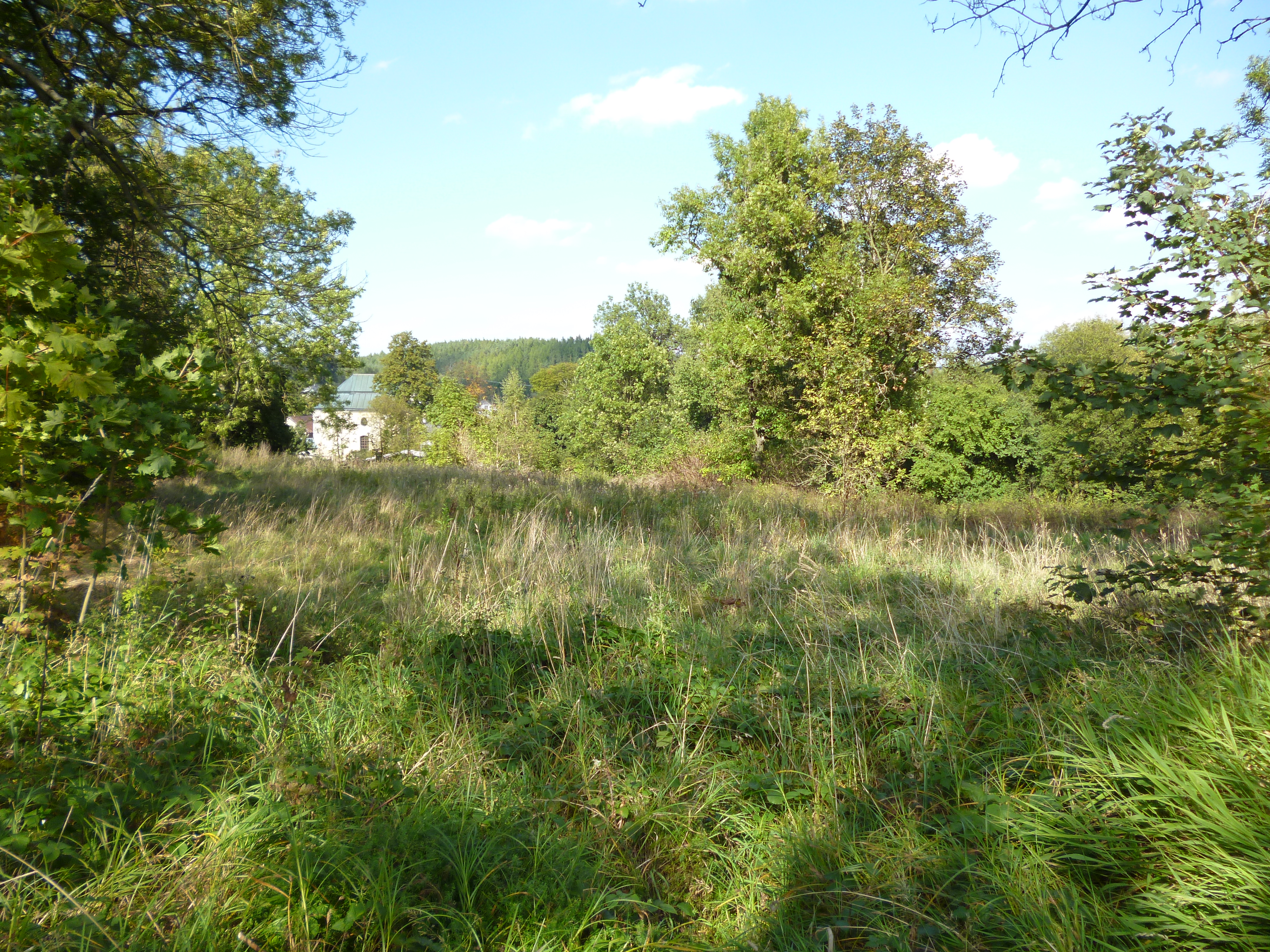 Mirošov - Zámek - pozemek, kde zámek původně stával